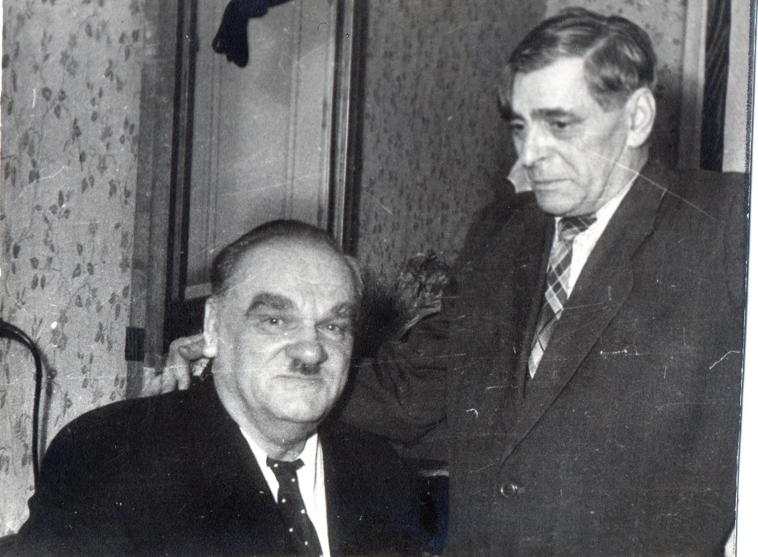 Филипп Фёдорович Булыкин и Роберт Иванович Бриченок